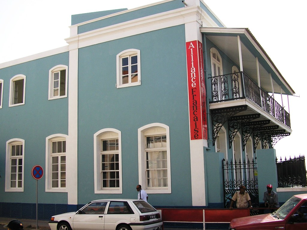 "Alliance Française" in Mindelo, São Vicente island, Cape Verde